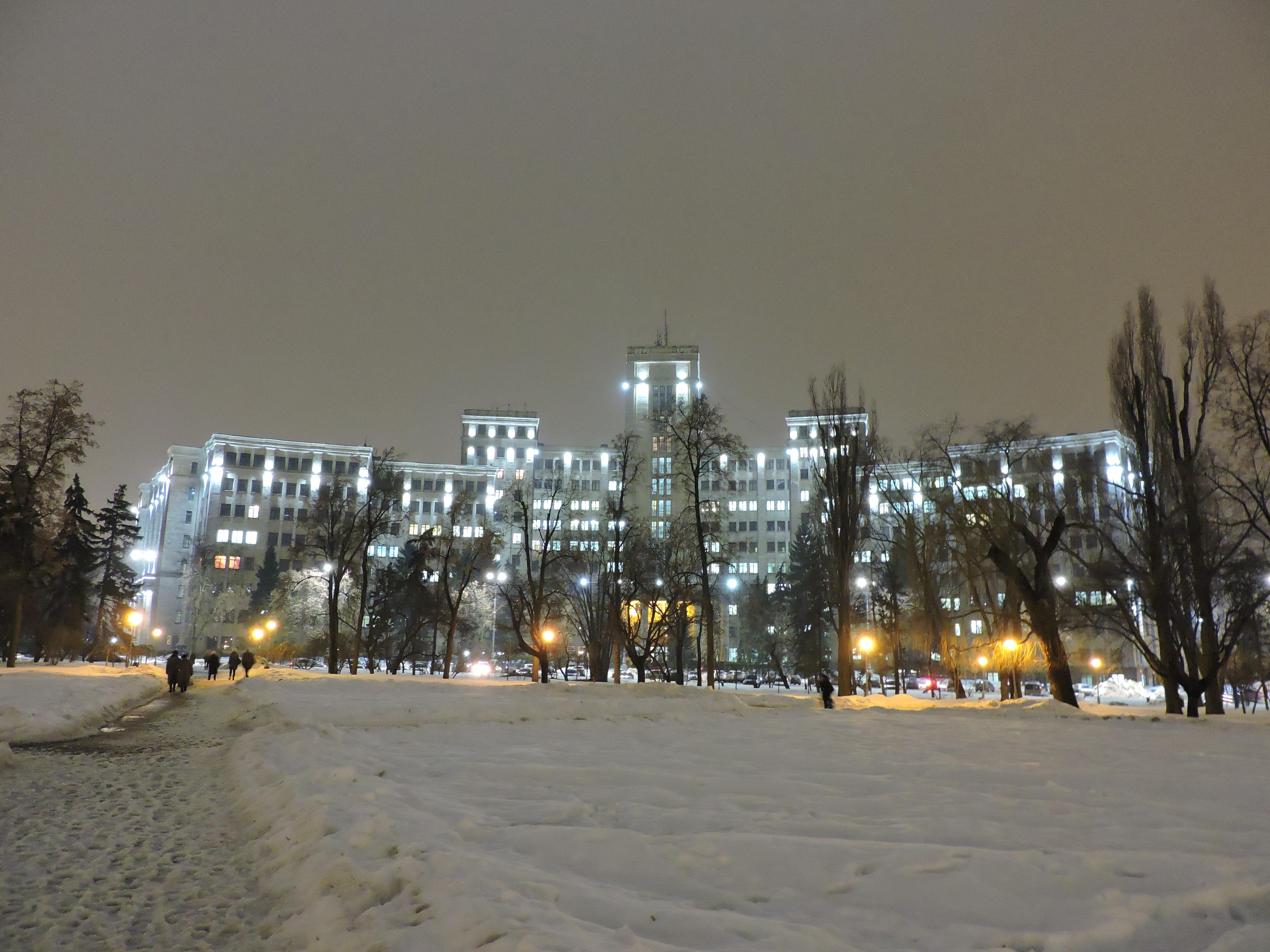 Головний корпус Харківського національного університету імені В. Н. Каразіна зимовим вечором. Лютий 2019 року.